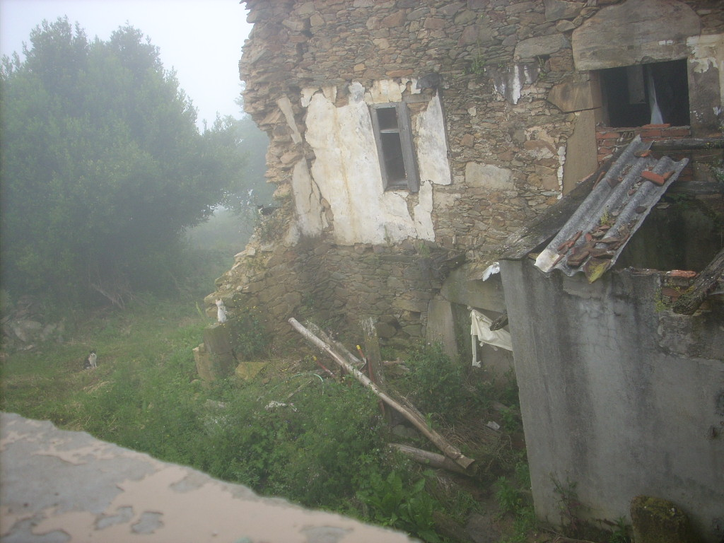 Antigua casa de Fastias ya en ruinas